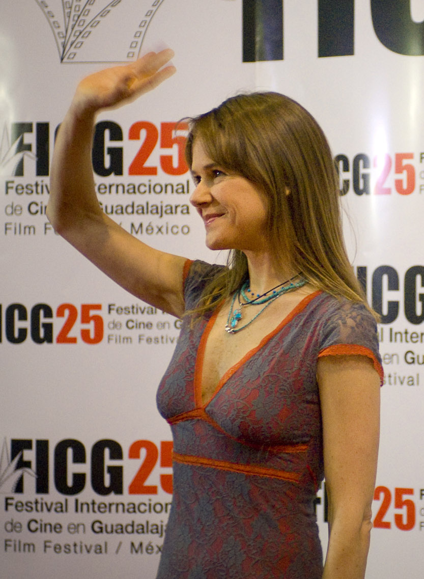 Nailea Norvind, en la alfombra roja de la premier de la película Seguir siendo, de Ernesto Contreras y José Manuel Cravioto, dentro de las actividades del Festival Internacional de Cine de Guadalajara en su edición 25. 14 de Marzo, 2010. Guadalajara, México. © Cortesía FICG25 / Michel Amado Carpio.